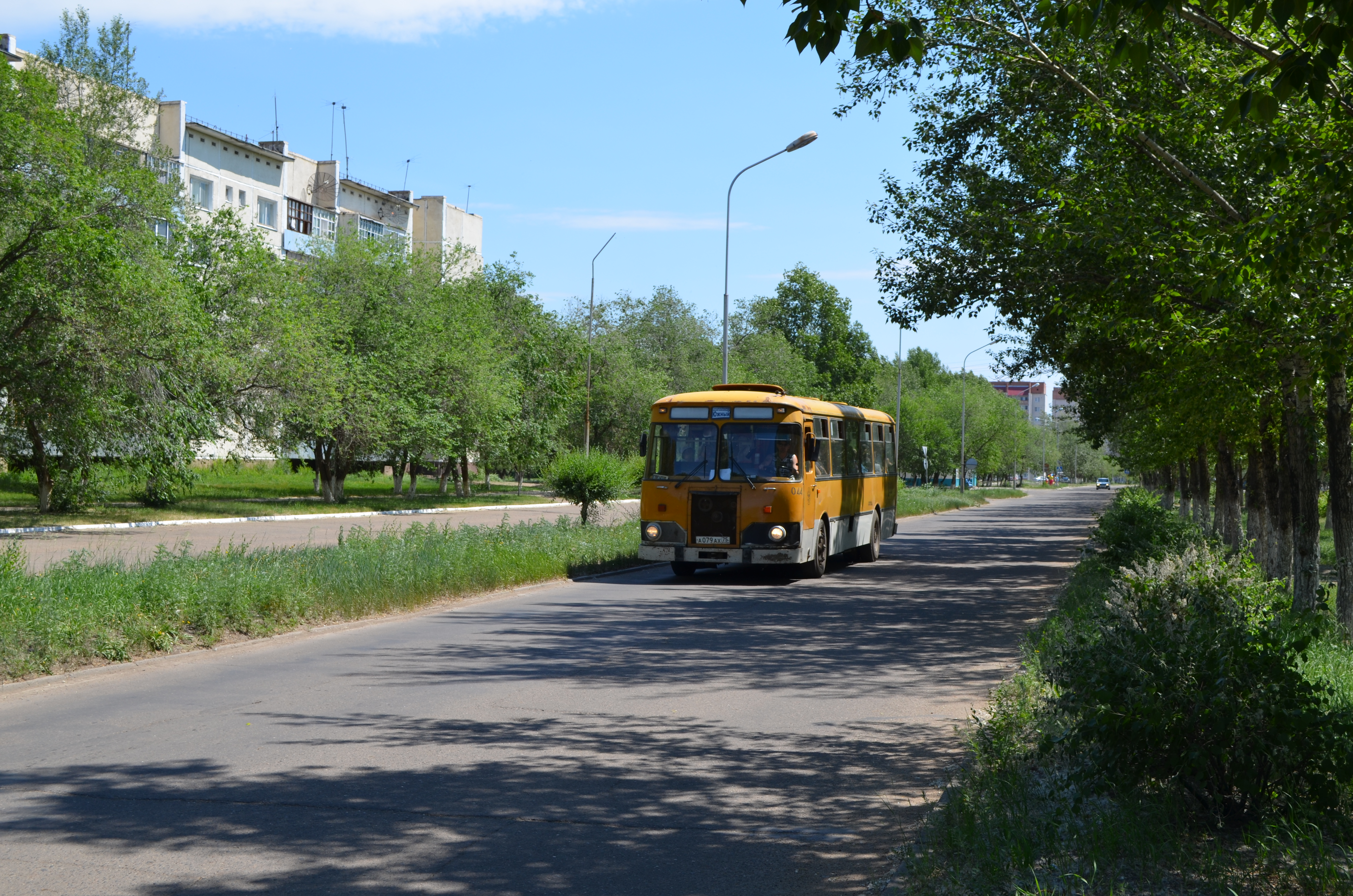 снимки конца июня - начала июля 2015 г.